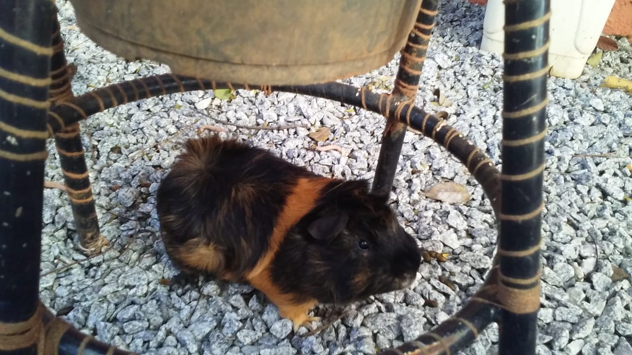 Porquinho-da-índia da raça abissínio